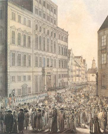 Der Weberaufstand 1794 in Augsburg, aquarellierte Federzeichnung, Kunstsammlungen Augsburg (G 739)